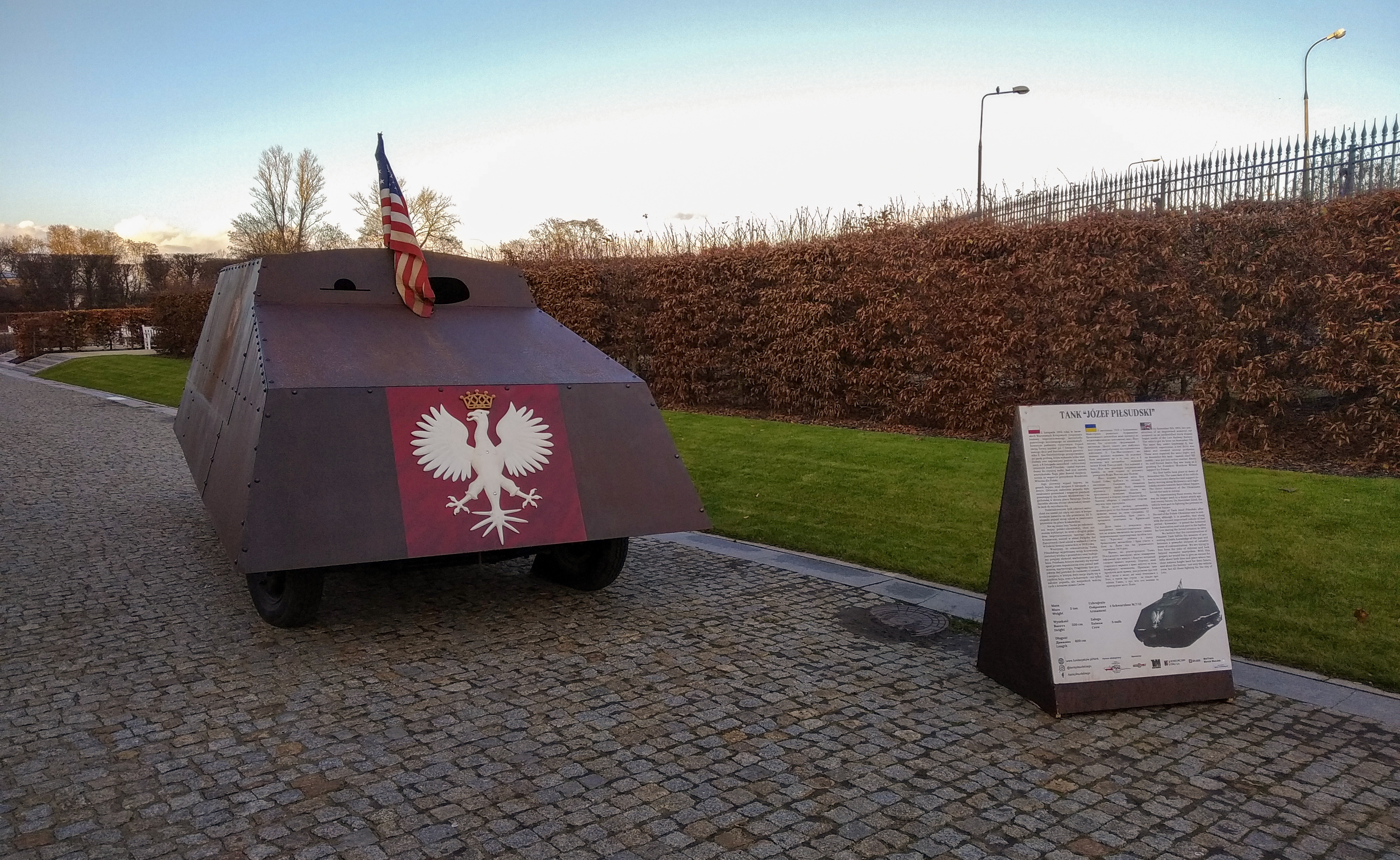 Tank Piłsudskiego - rekonstrukcja podczas Targów Książki Historycznej w Warszawie